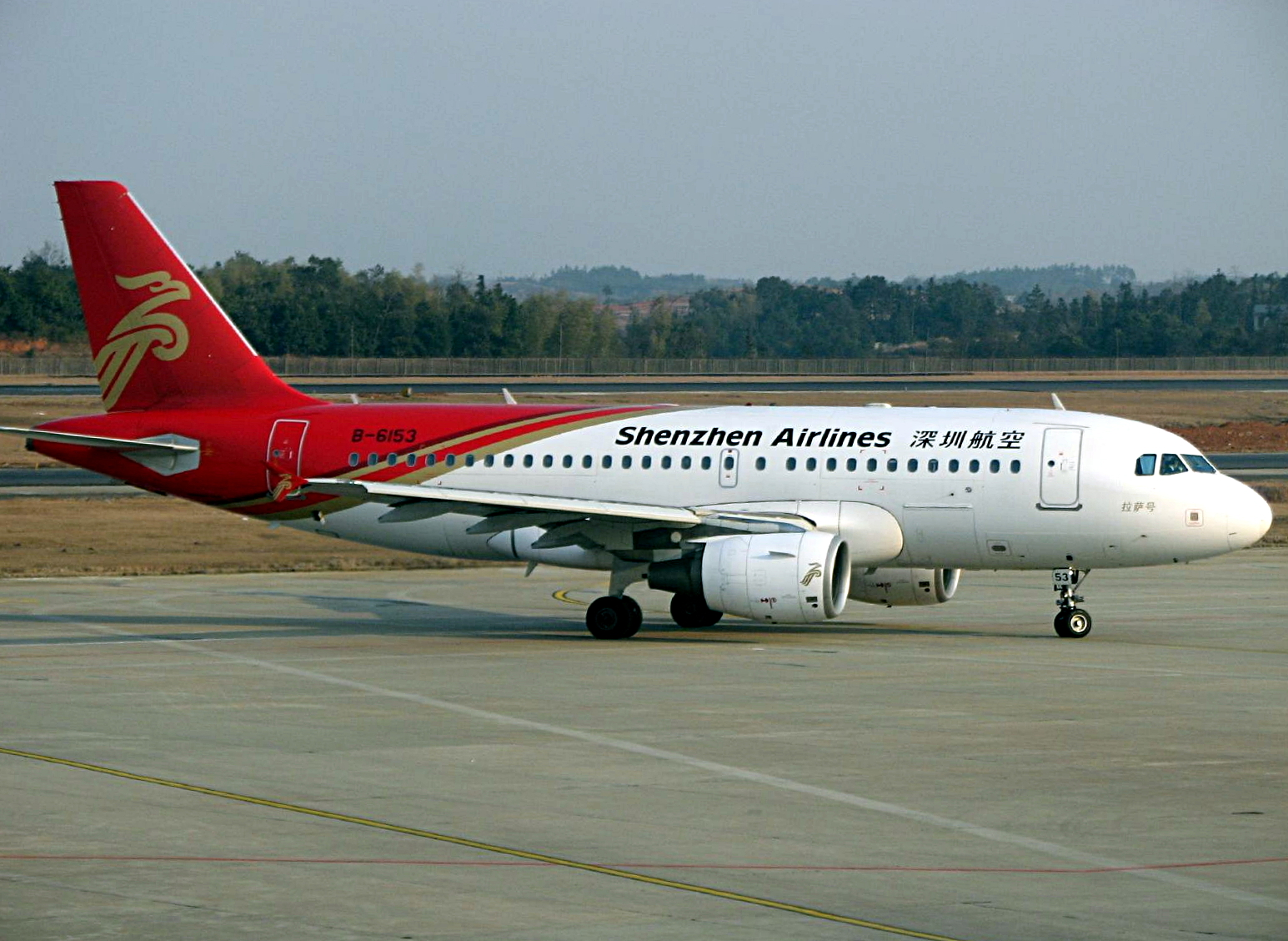 一架停在长沙黄花国际机场的深圳航空班机